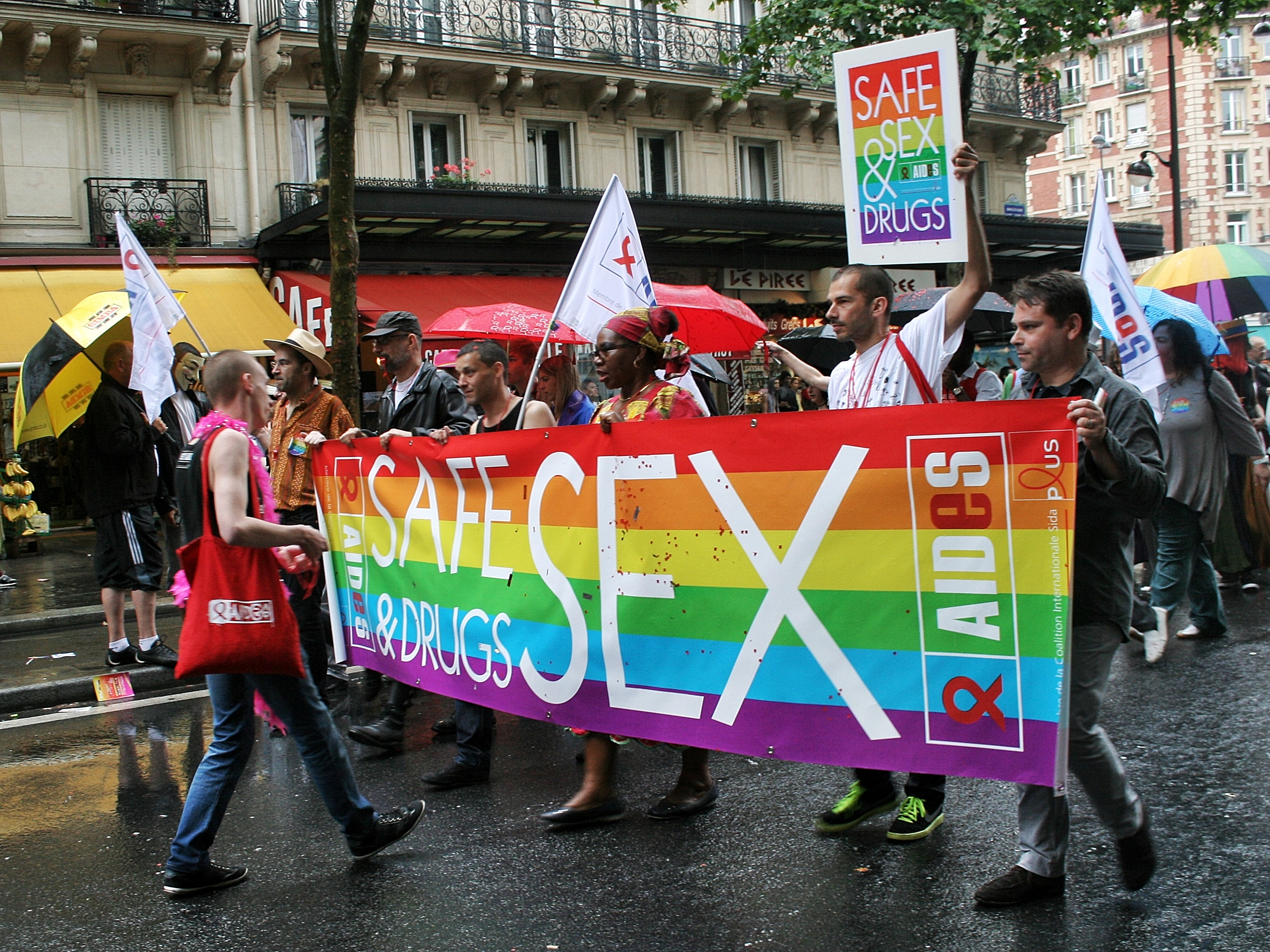 Photos de la Marche des Fiertés LGBT de Paris, le 28 Juin 2014